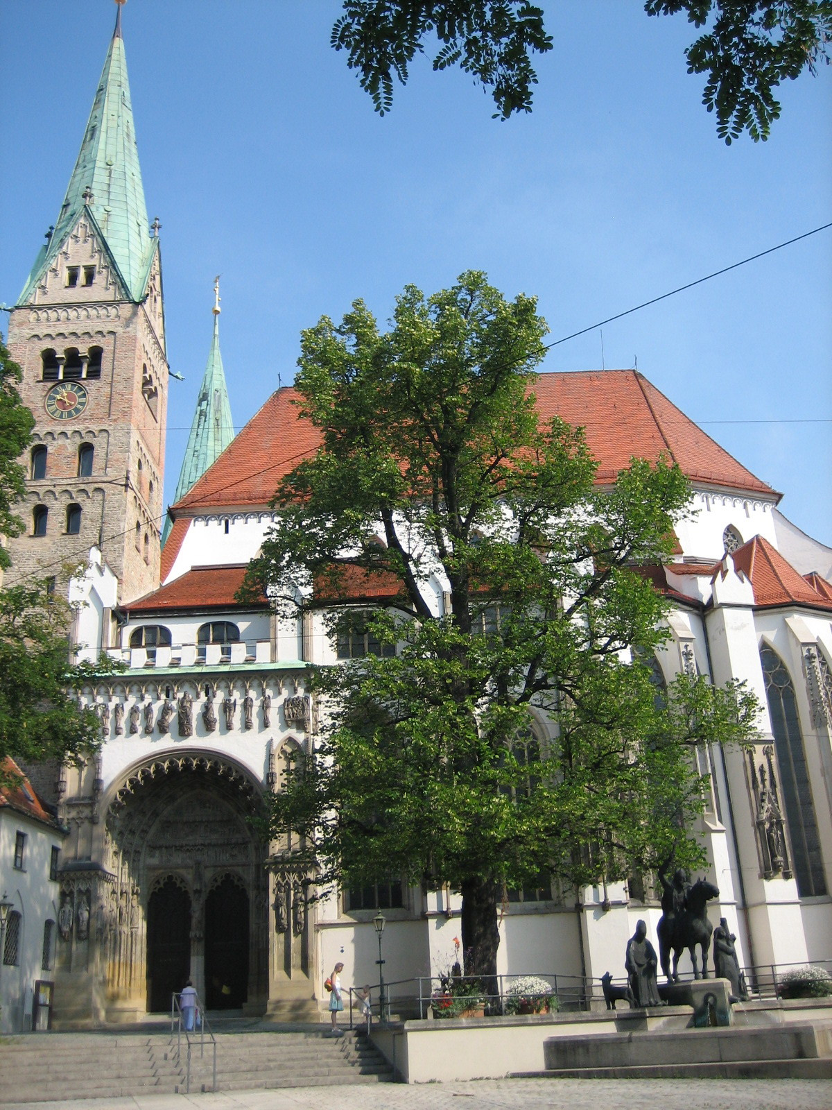 Domportal in Augsburg mit Brunnen der Bistumsheiligen, vom Domvorplatz